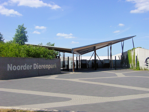 Foto door Richard B.